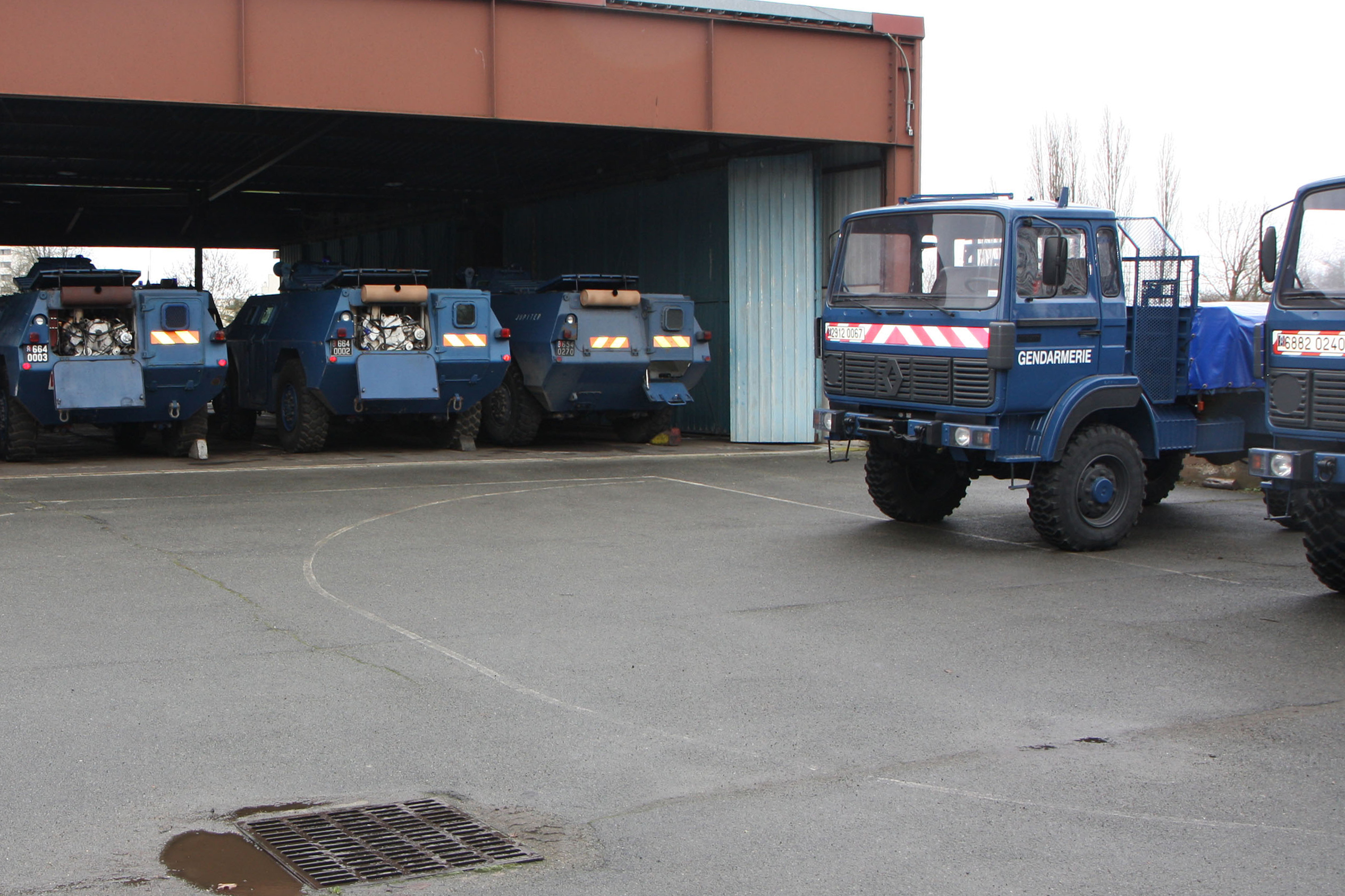 VBRG et Véhicules DRAP à Satory